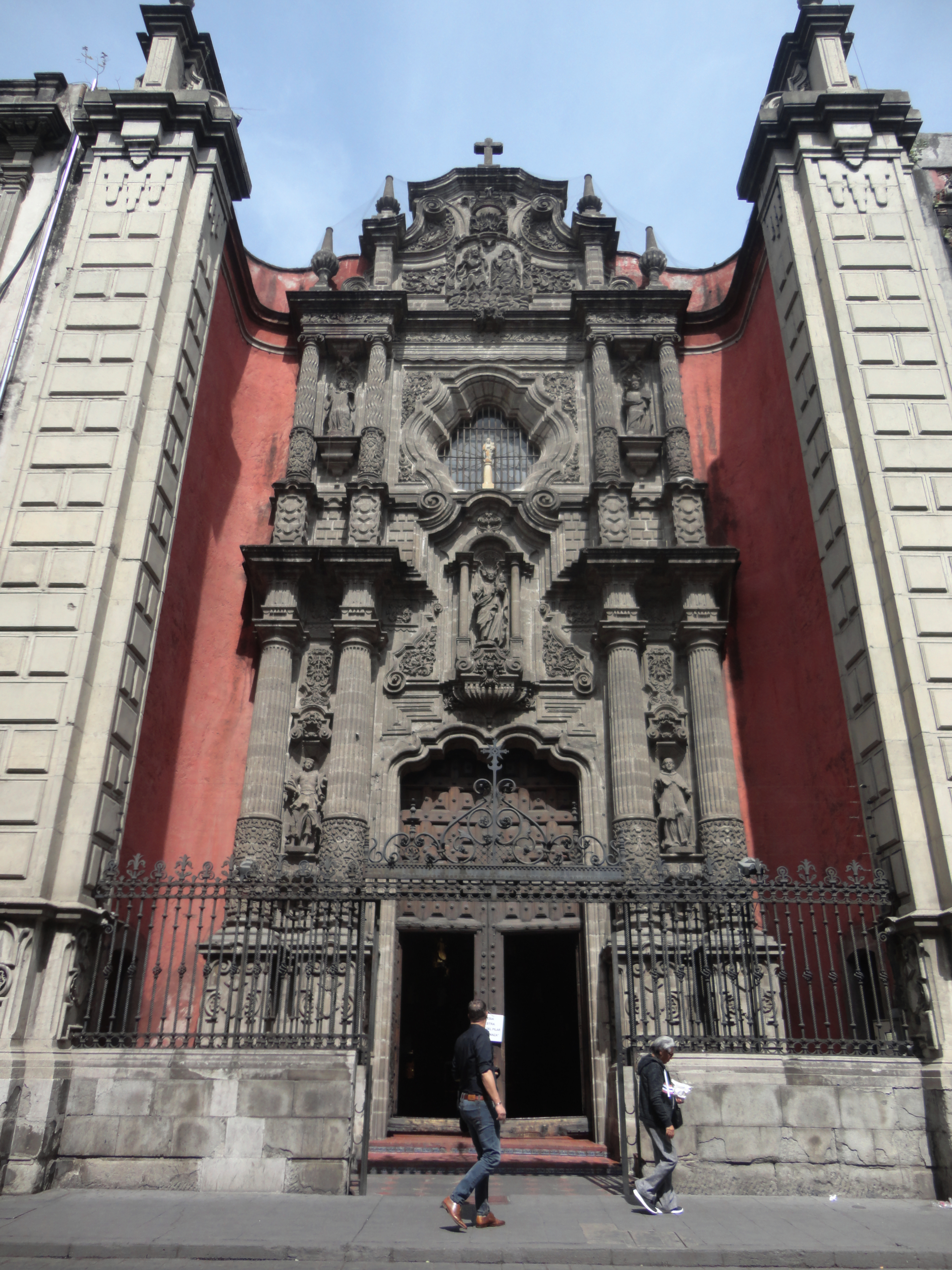 Templo de la Enseñanza "Nuestra Señora del Pilar", Ciudad de México